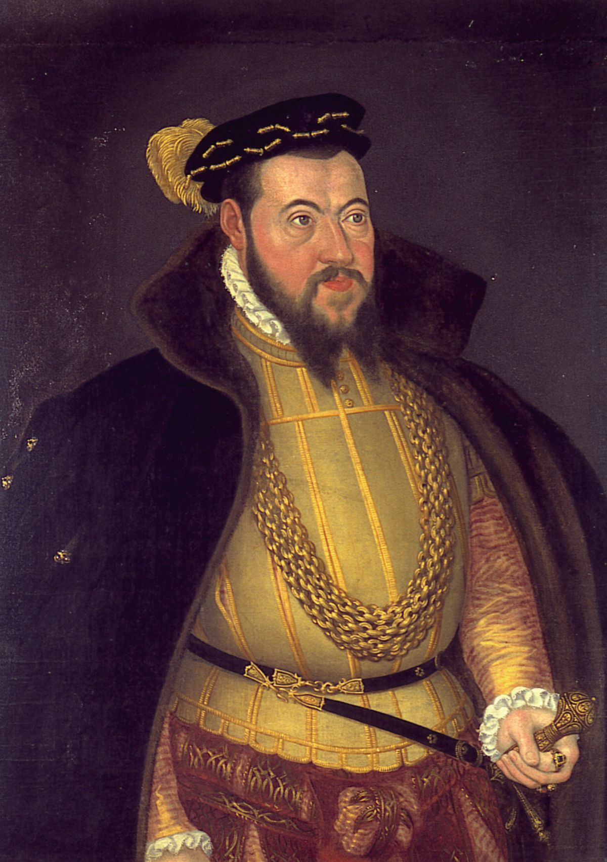 Bildnis des Pfalzgrafen Wolfgang von Zweibrücken-Neuburg